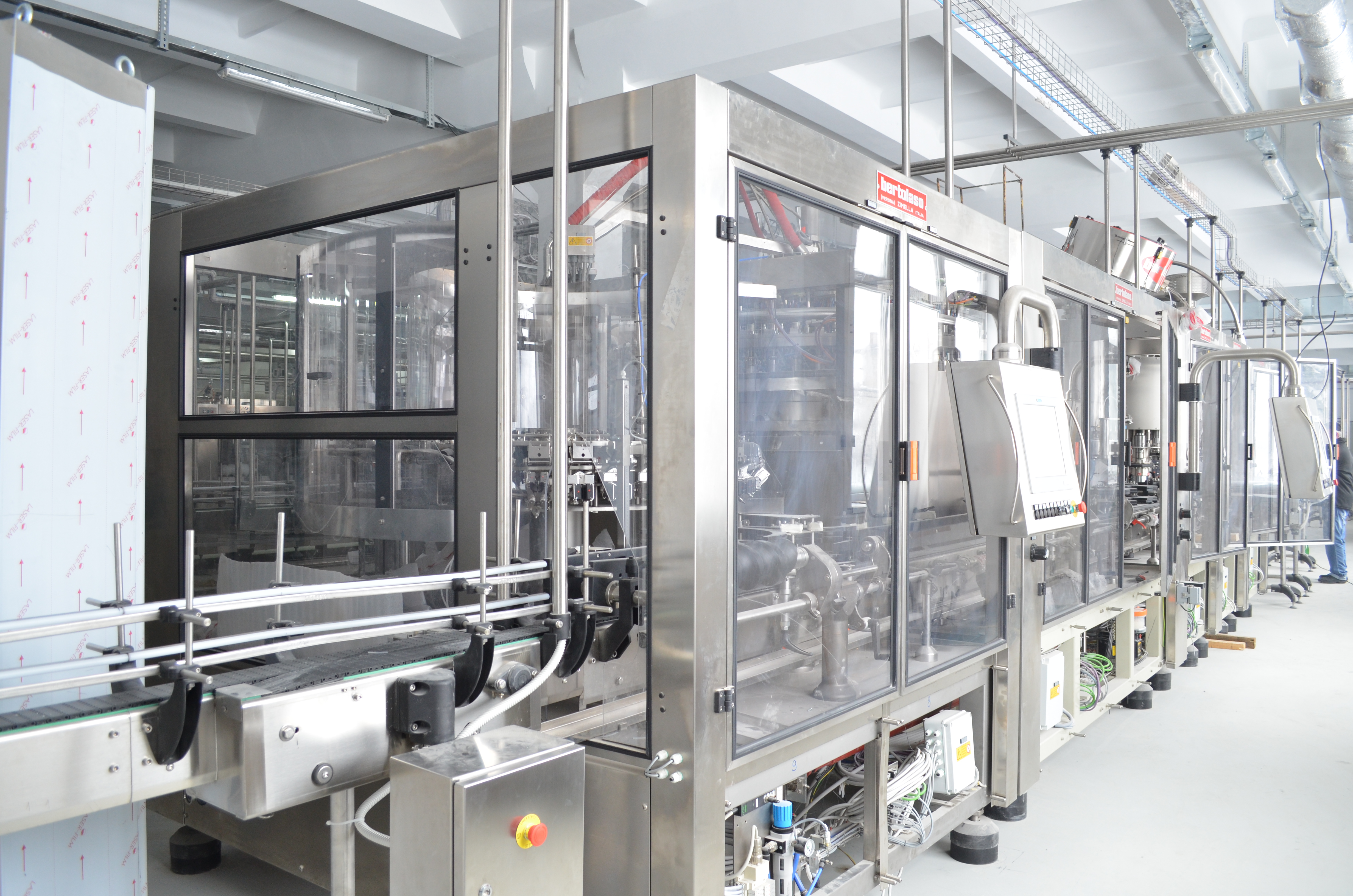 Abfülllinie von Bertolaso von 2014